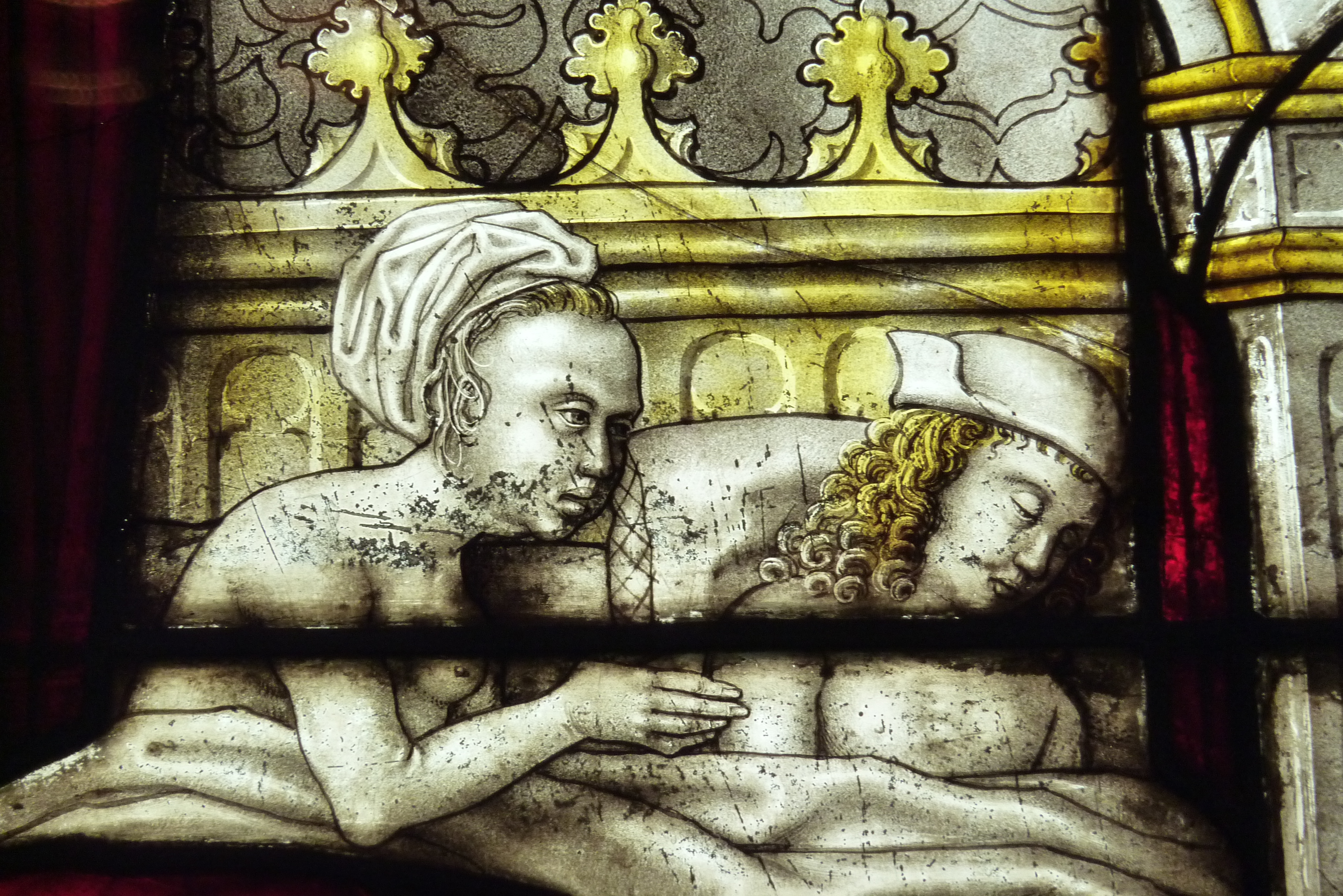 Bleiglasfenster (Ausschnitt) im Museum Schnütgen in Köln, Darstellung: „Bernhards Versuchung durch das Mädchen“, Köln um 1510 bis 1530, Inventar-Nr.: M 565. (siehe: Brigitte Lymant: Die Glasmalereien des Schnütgen-Museums. Schnütgen-Museum, Köln 1983)/ehemals im Kreuzgang des Kloster Altenberg (siehe Dagmar Täube: Rheinische Glasmalerei. Meisterwerke der Renaissance, Bd. II Katalog, Schnell und Steiner, Regensburg 2007, ISBN 978-3-7954-1944-8, Katalog-Nr. 5